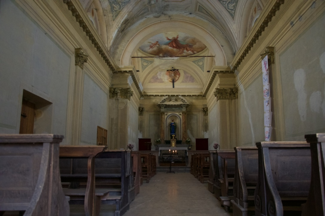 Santuario di San Bartolomeo interno